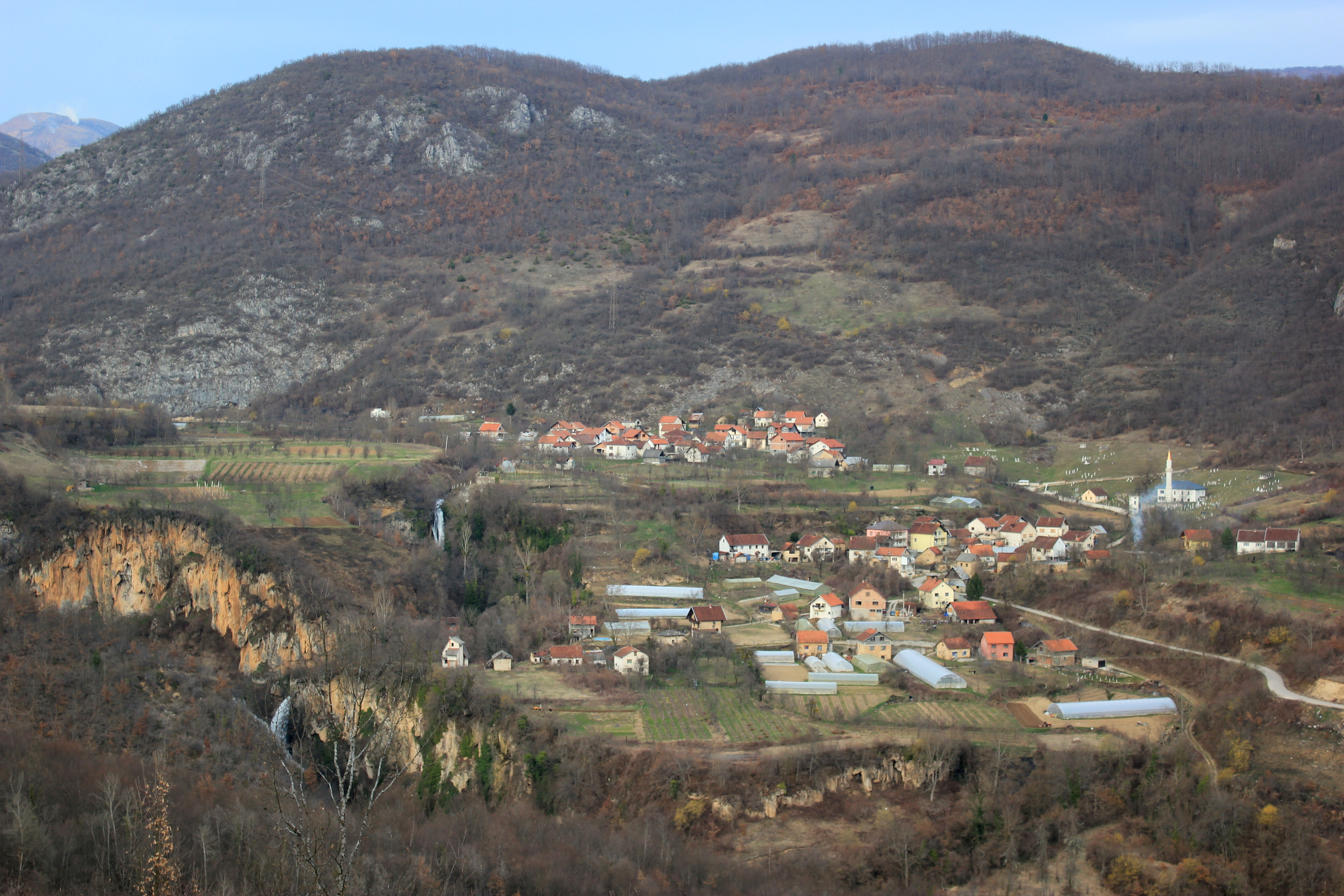 Das Dorf Duge in der Gemeinde Prozor-Rama, Bosnien und Herzegowina.